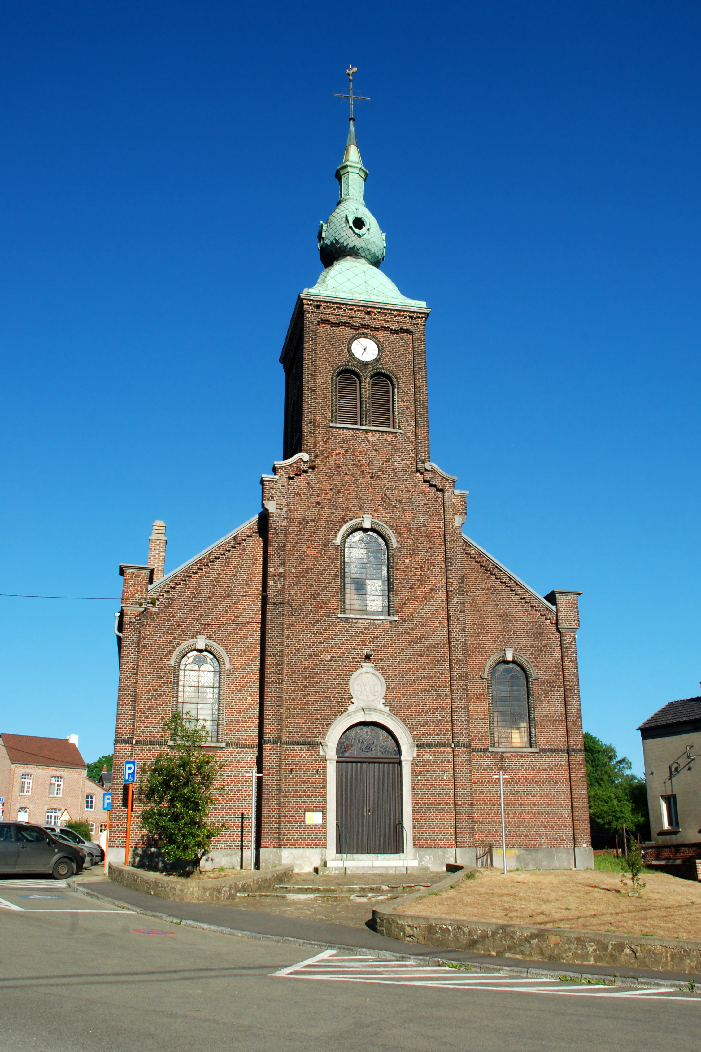 Belgique - Brabant wallon - Villers-la-Ville - Marbisoux - Église Notre-Dame (architecte Émile Coulon)